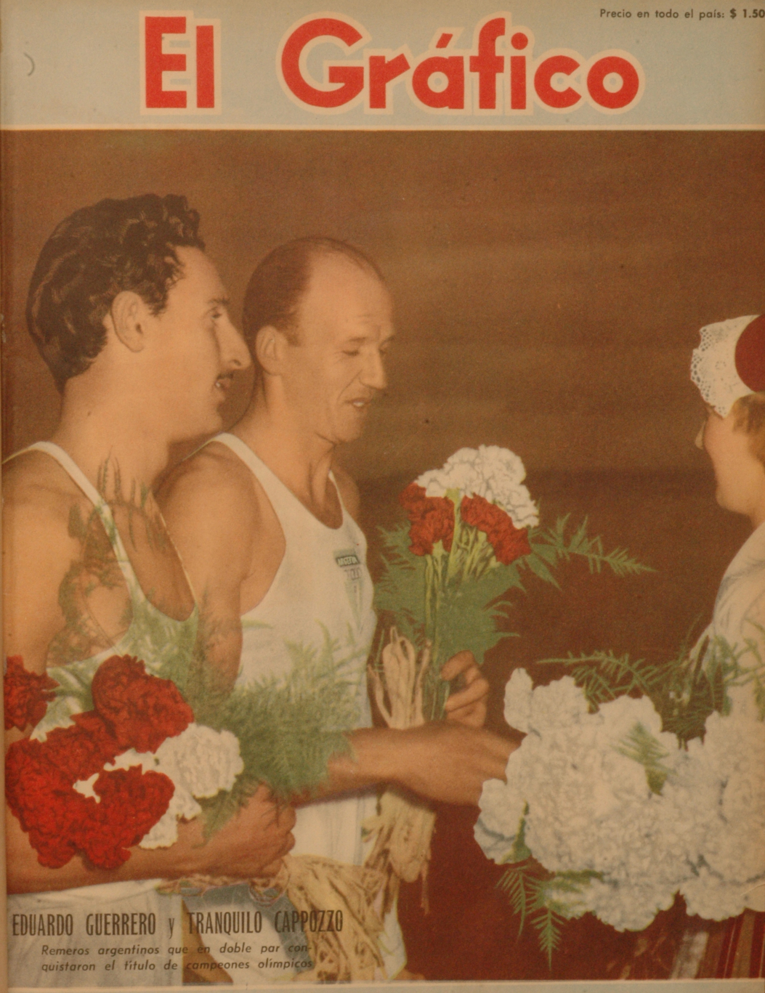 El Grafico del 22 de Agosto de 1952. Edicion 1724